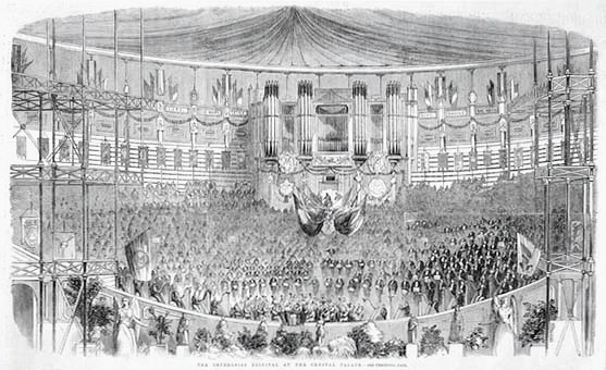 Le festival des orphéons au Crystal Palace à Londres avec 3000 orphéonistes français.